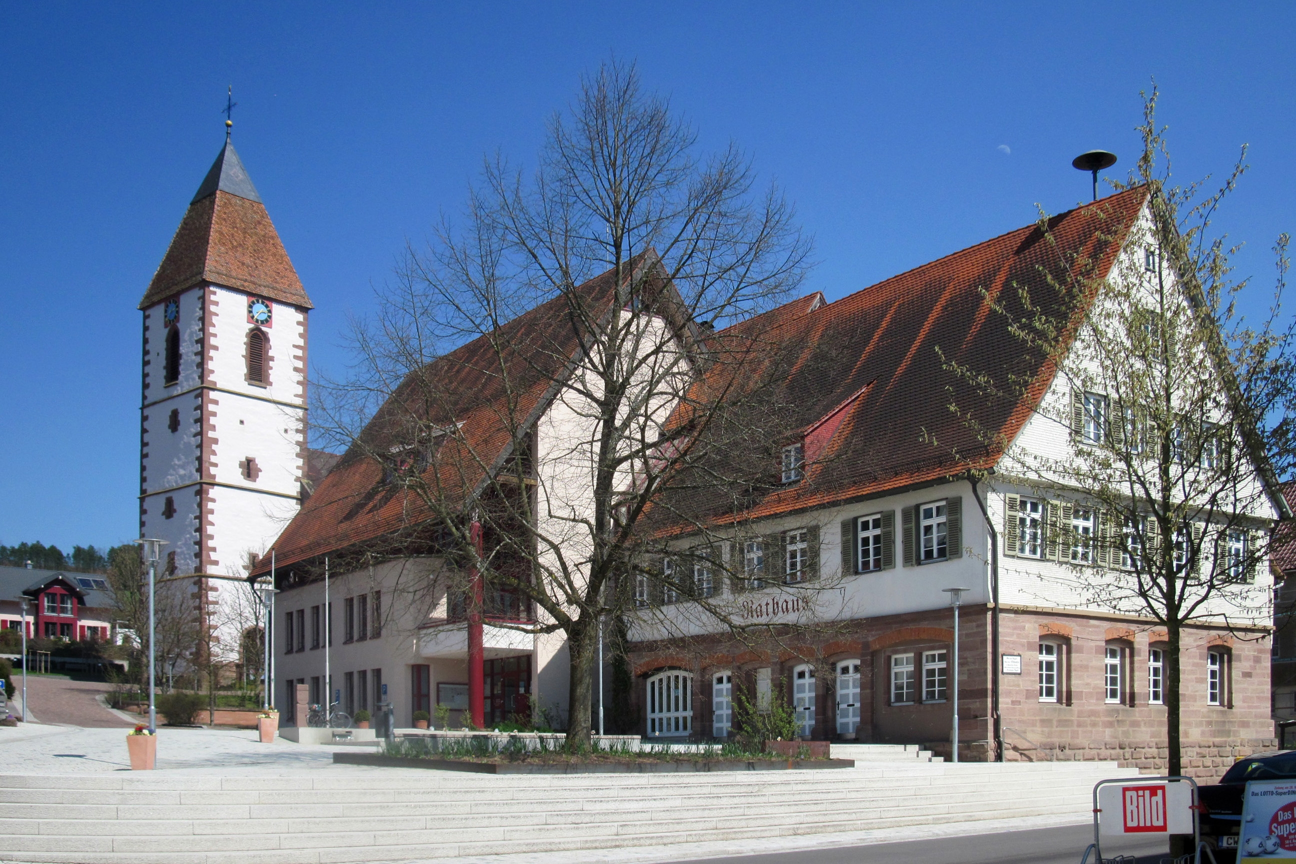 Rathaus Ebhausen Alt- und Neubau